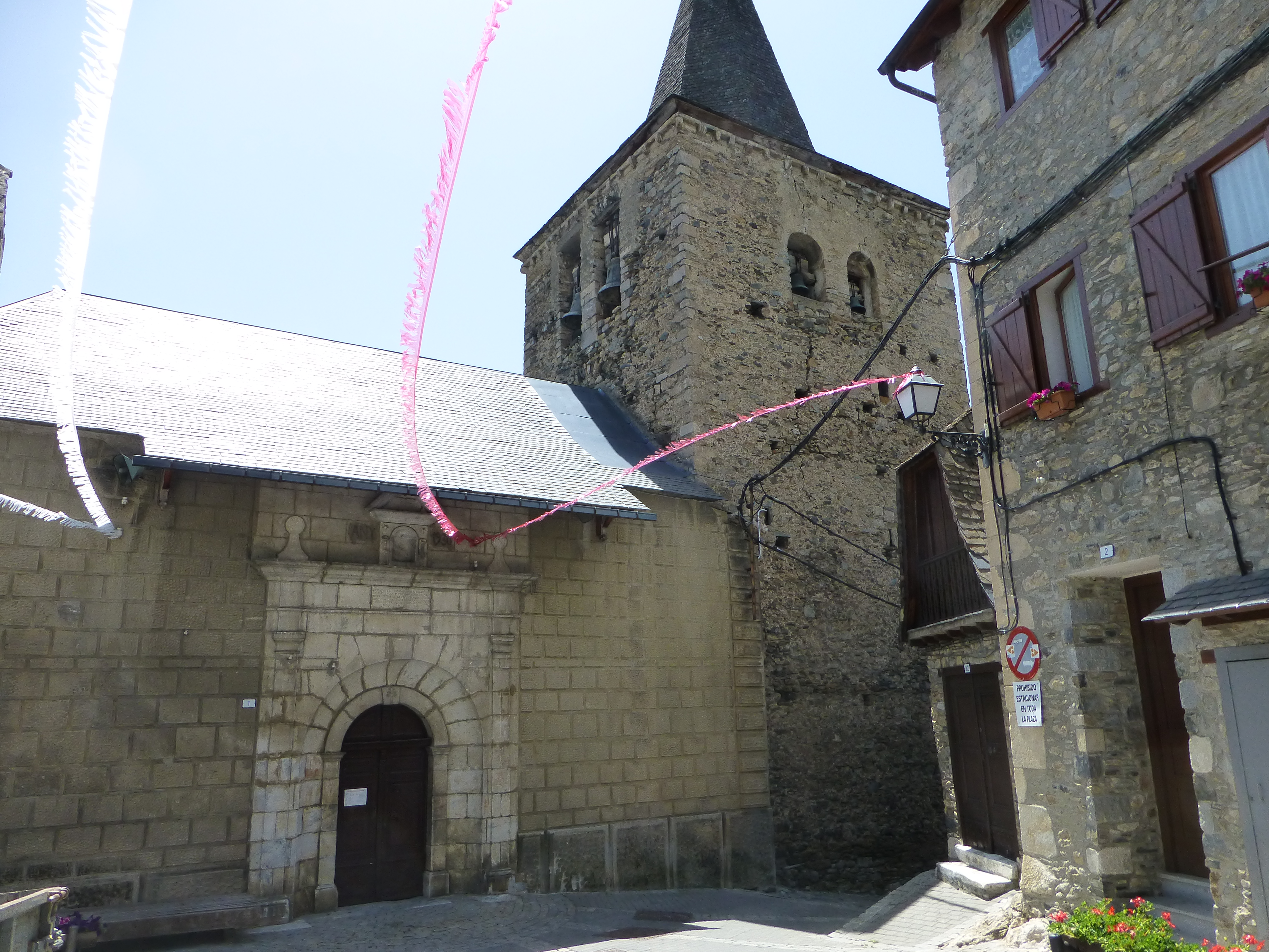 Iglesia de Sant Pèir. Gessa, Val d'Aran, Cataluña, España.